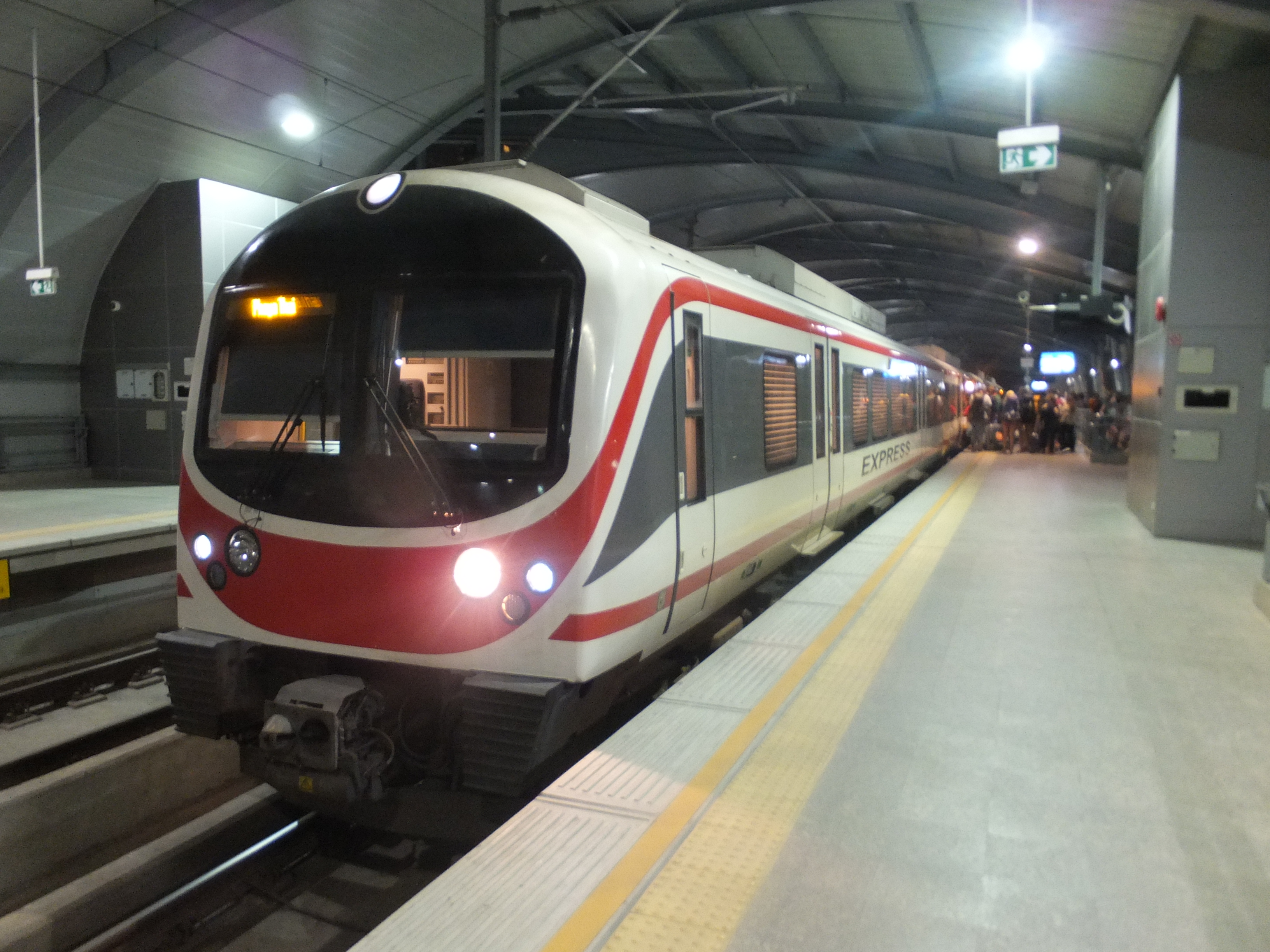 バンコク、エアポート・レール・リンクのエクスプレス用車両、外観。City Lineとして間合い運用している。